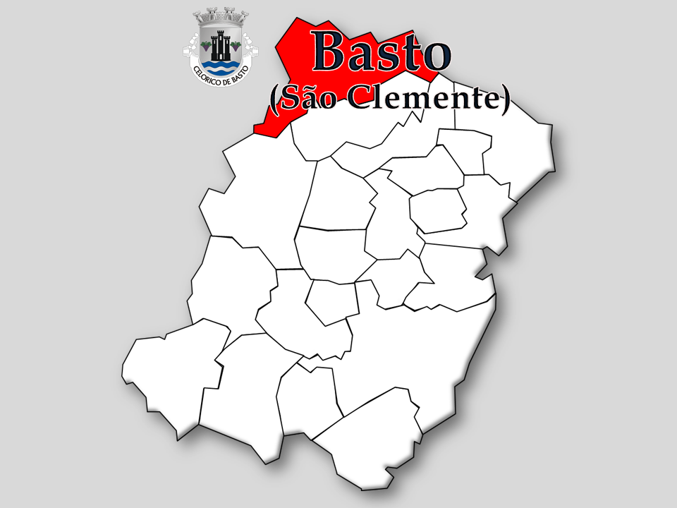 Censos 1864/2011